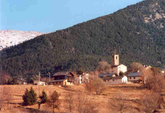 Saint-Pierre-dels-Forcats ; Vue depuis LA CABANASSE